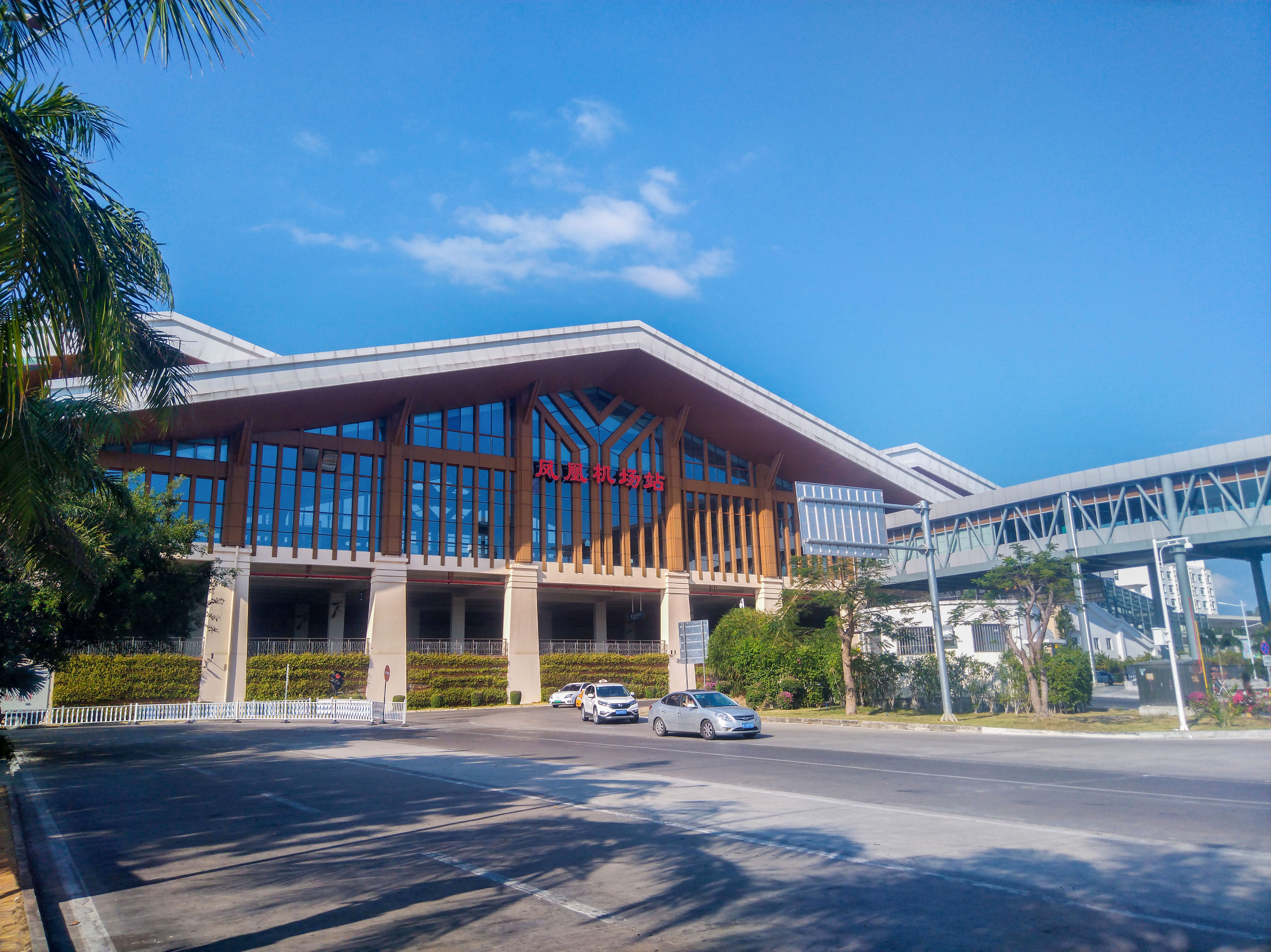 海南西环高速铁路凤凰机场站